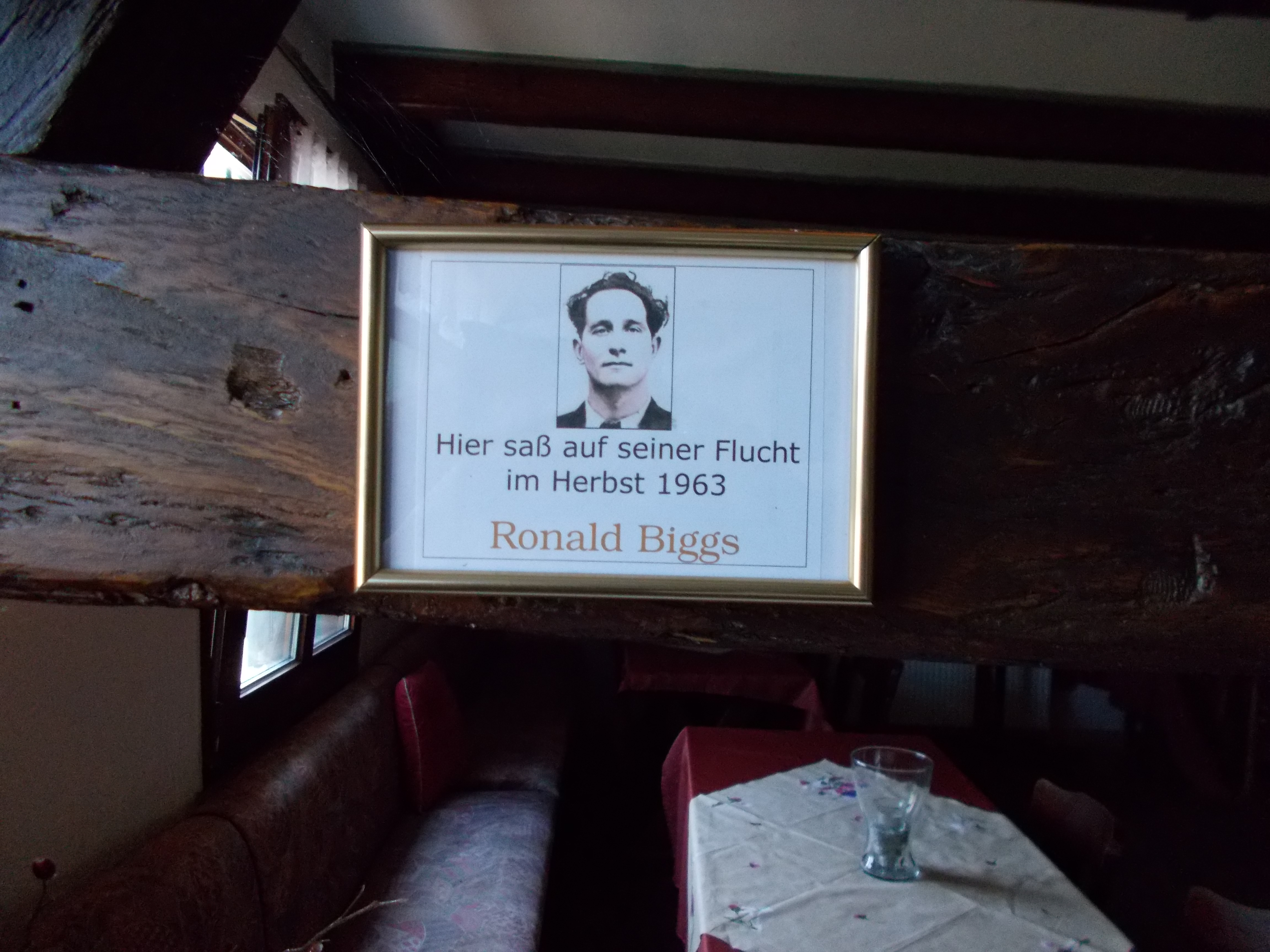 Innenansichten der Fünte in Mülheim an der Ruhr. Auf diesen Platz saß 1963 der Postzugräuber Ronald Biggs.